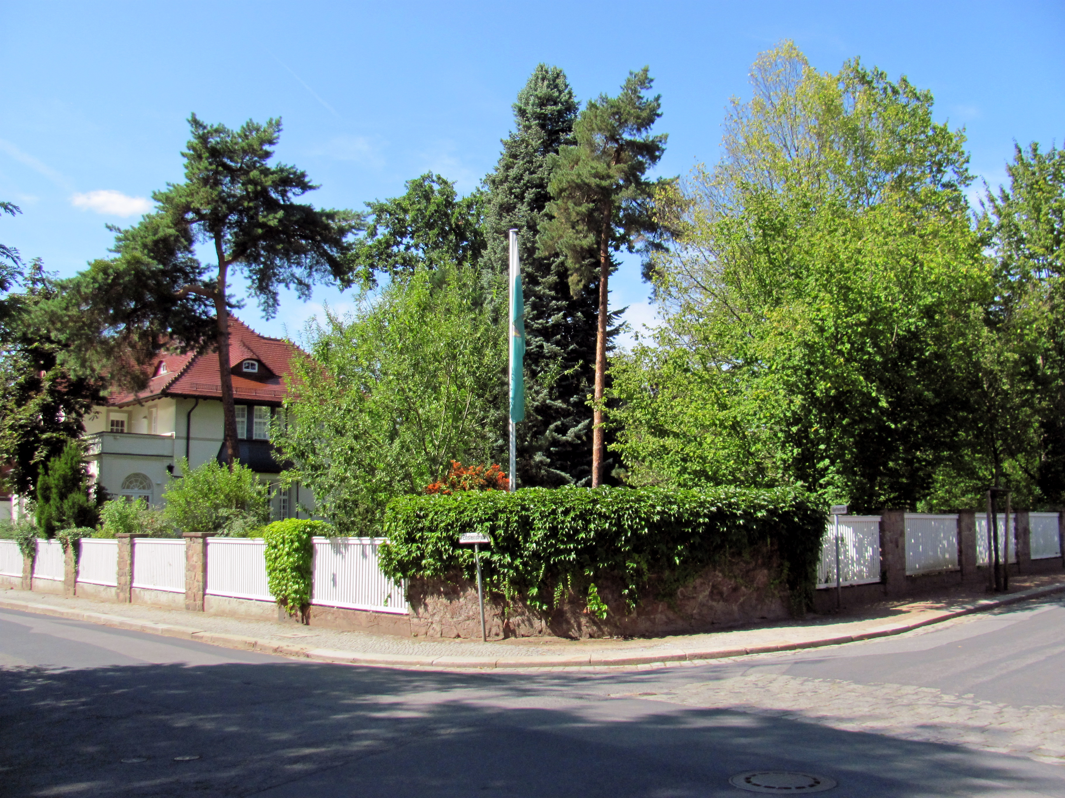 Radebeul (Gemarkung), Garten der Villa Heinrich Findeisen